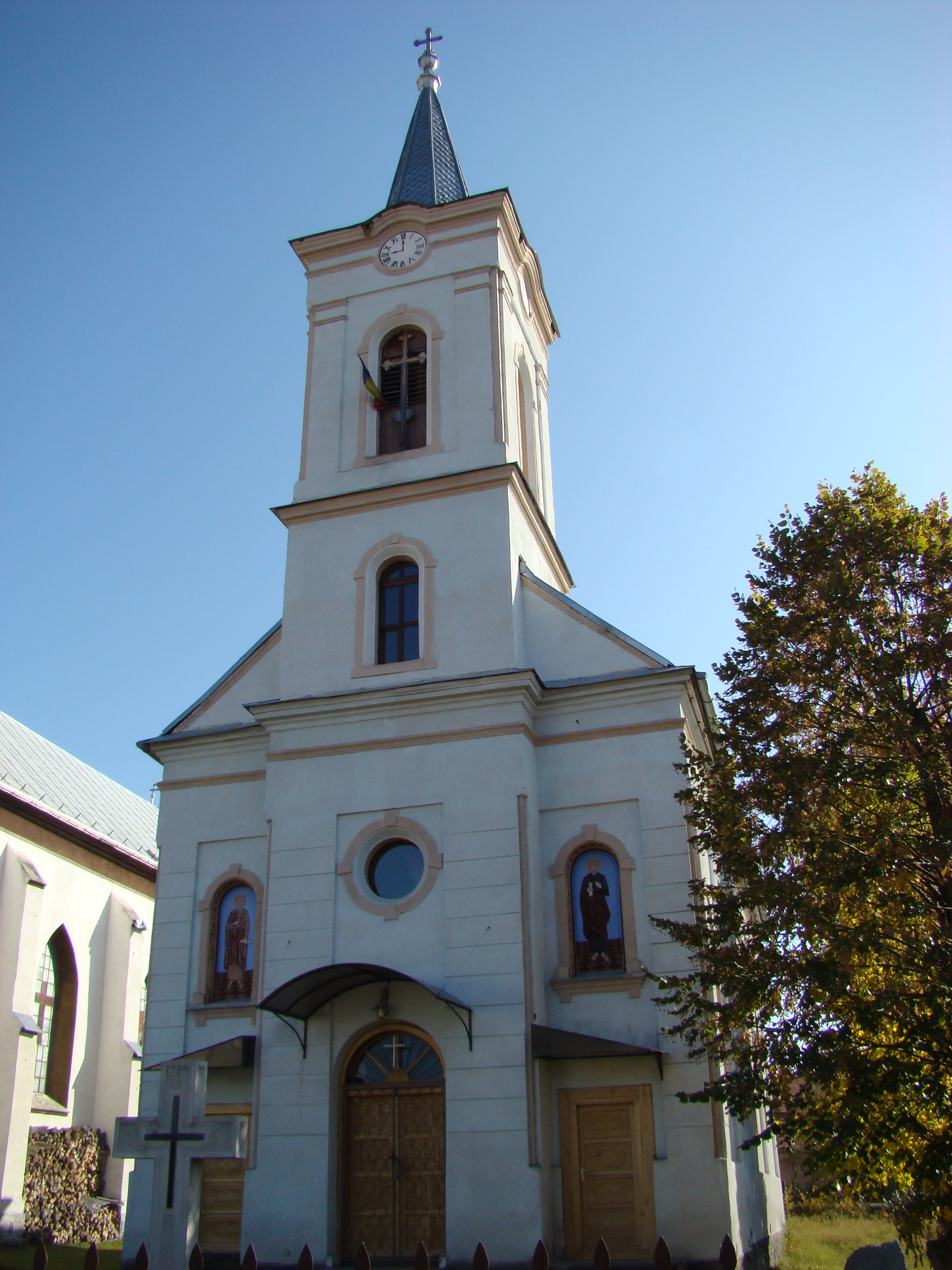 Biserica grco-catolică din Ibănești, județul Mureș